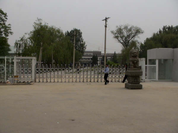 北京市101中学校门